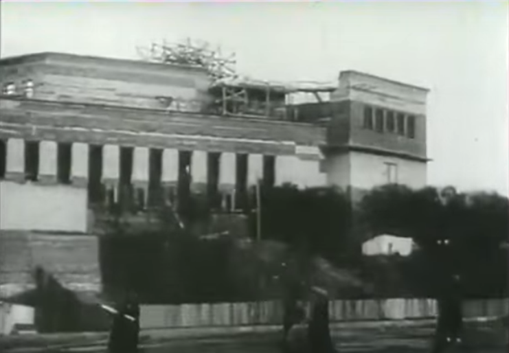 Строительство Дворца искусств в Иванове